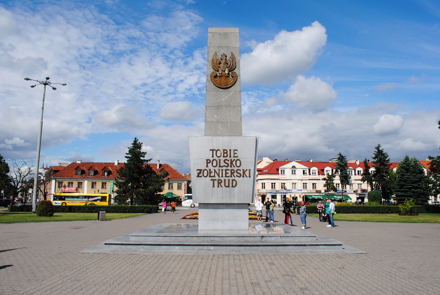 Pomnik na Placu Wolności we Włocławku